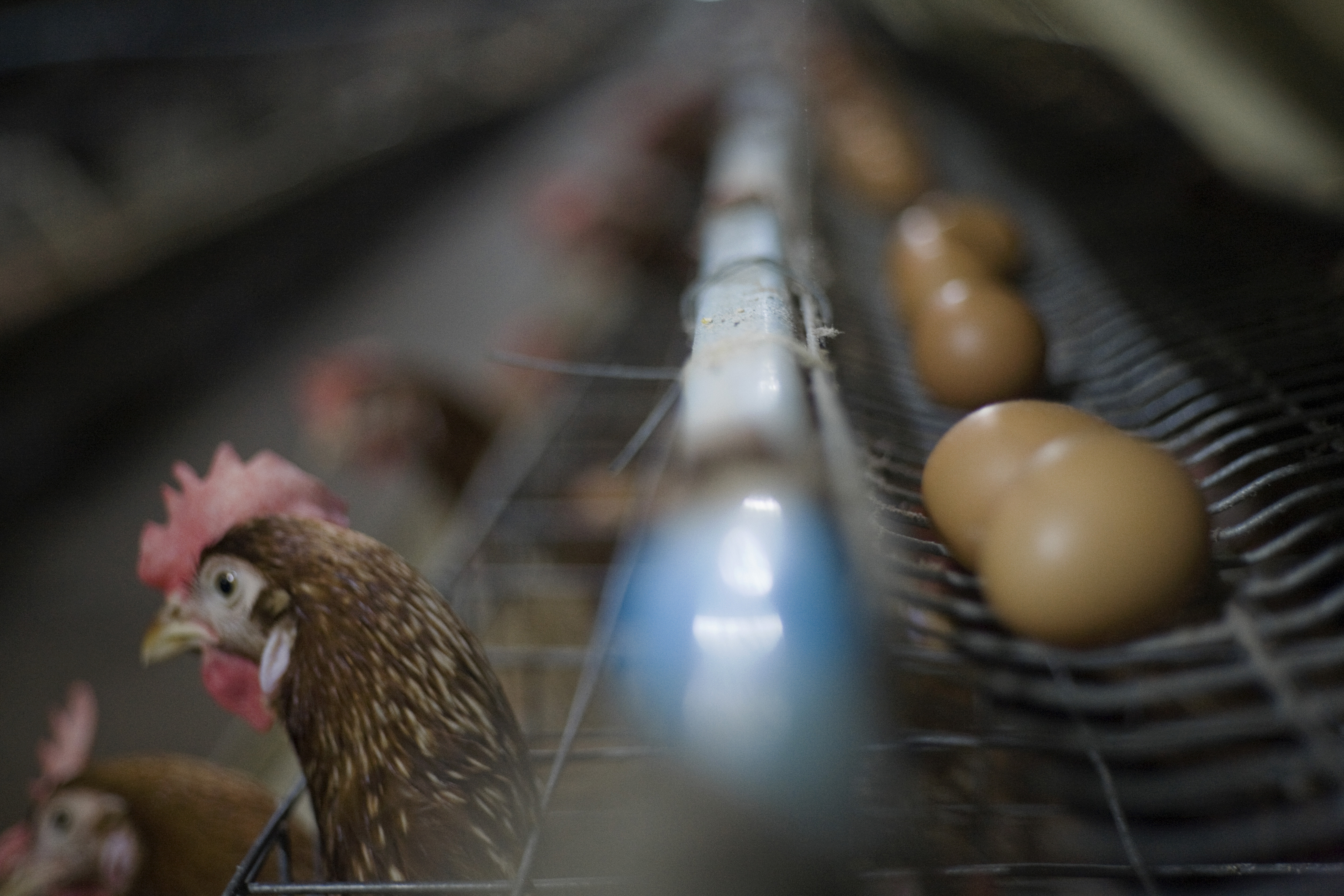 ไก่ไข่กับไข่ไก่ โรงเพาะเลี้ยงไก่ไข่ของคณะเกษตรศาสตร์ สาขาสัตวศาสตร์,สัตวบาล แห่งมหาวิทยาลัยเกษตรศาสตร์ วิทยาเขตบางเขน กรุงเทพฯ วันเสาร์ ที่ 17 กรกฏาคม พ.ศ.2553 (Photographer attached to the Prime Minister of the Kingdom of Thailand : Peerapat Wimolrungkarat / พีรพัฒน์ วิมลรังครัตน์)